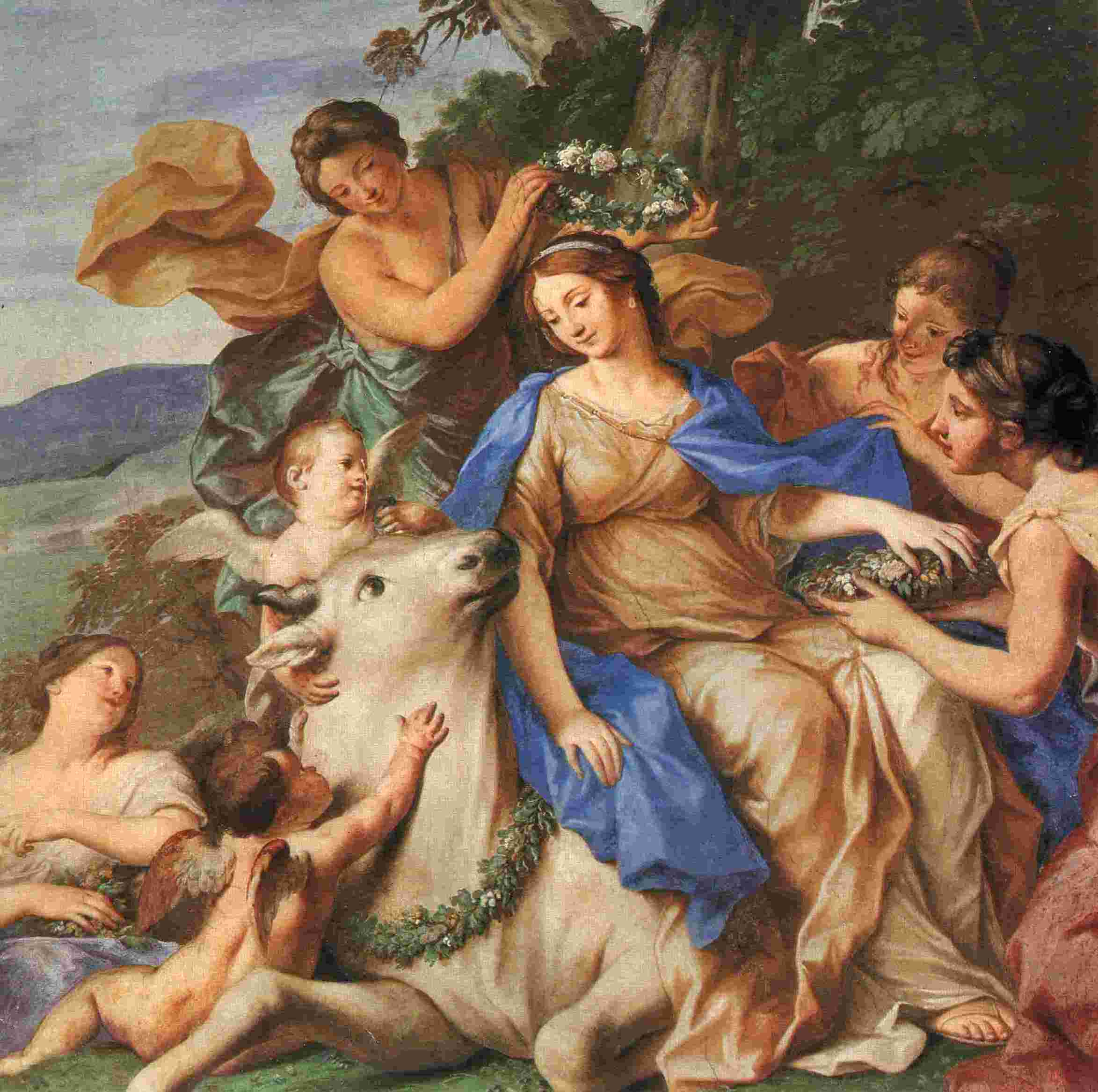 Il ratto di Europa (particolare). Affresco di Carlo Cignani nel Palazzo Ducale del Giardino (Parma).